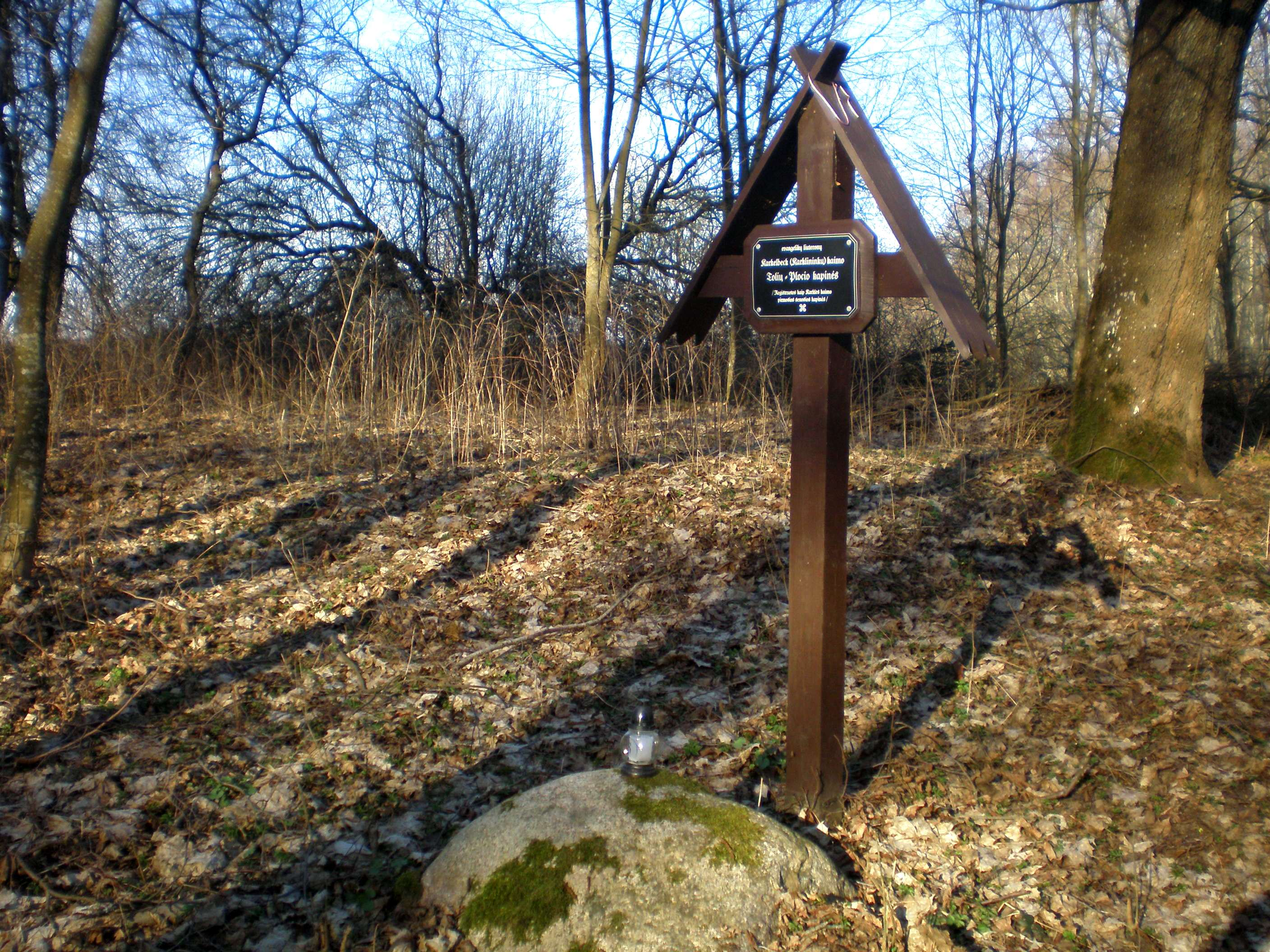 Karklės I kapinaitės, Klaipėdos raj.